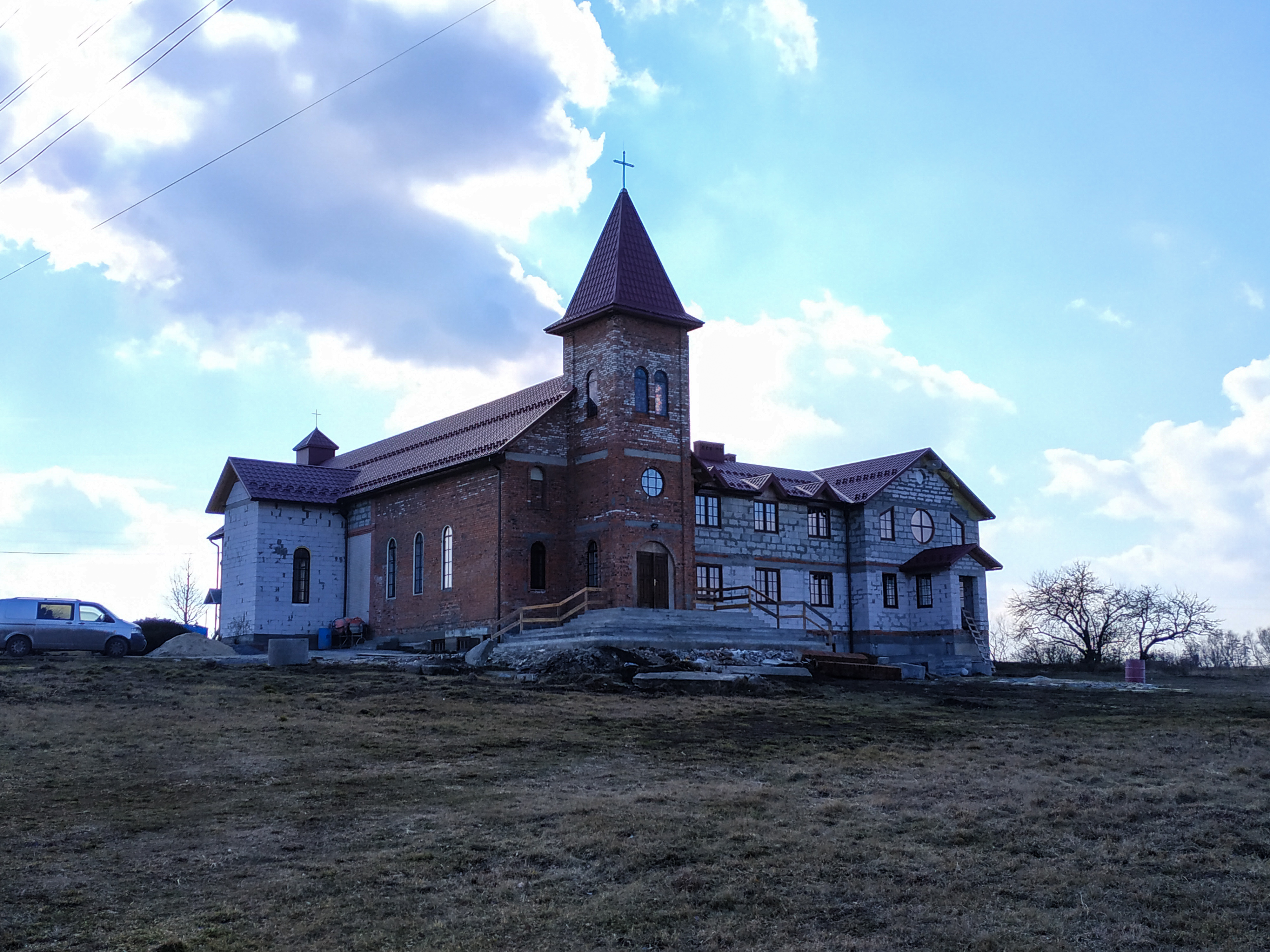 Монастир на вулиці Гагаріна